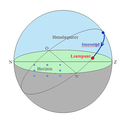 De sterredtijd is de uurhoek van het lentepunt